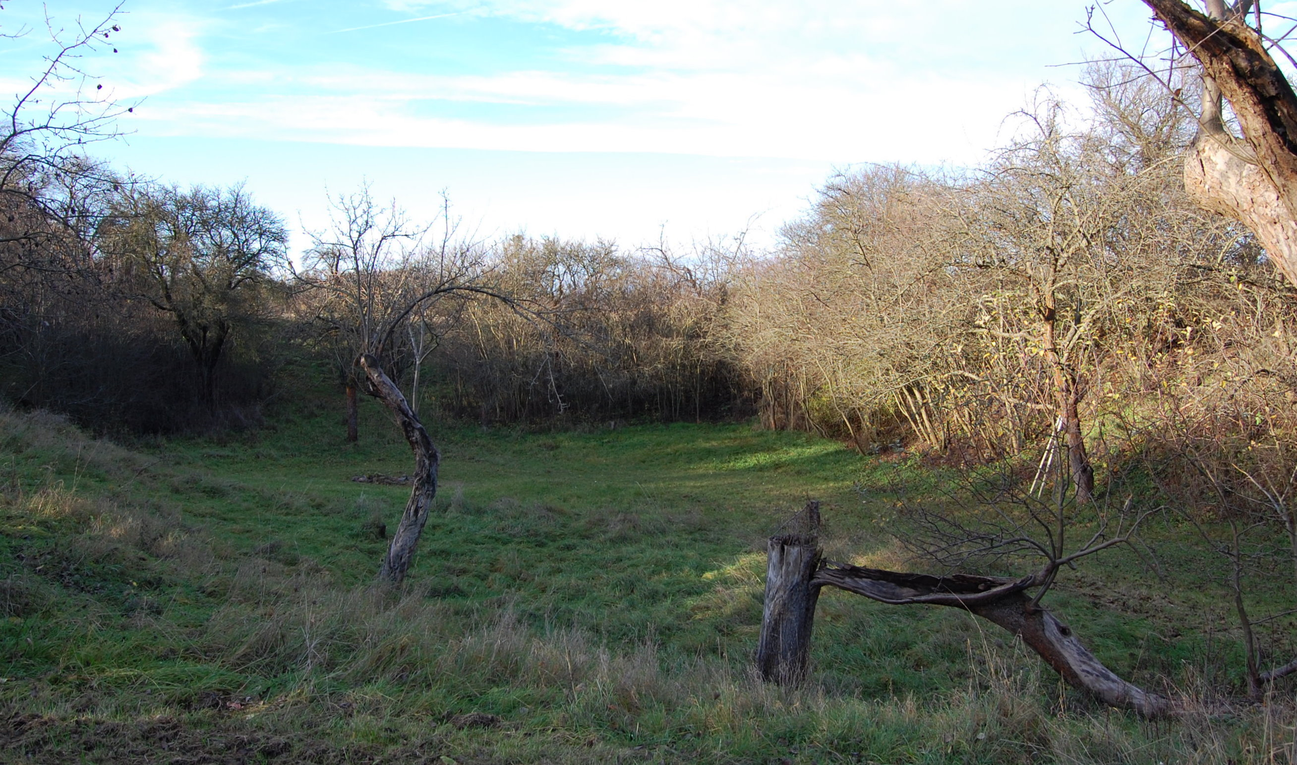 Grube in der Nähe der Sohlener Straße, Sohlener Berge